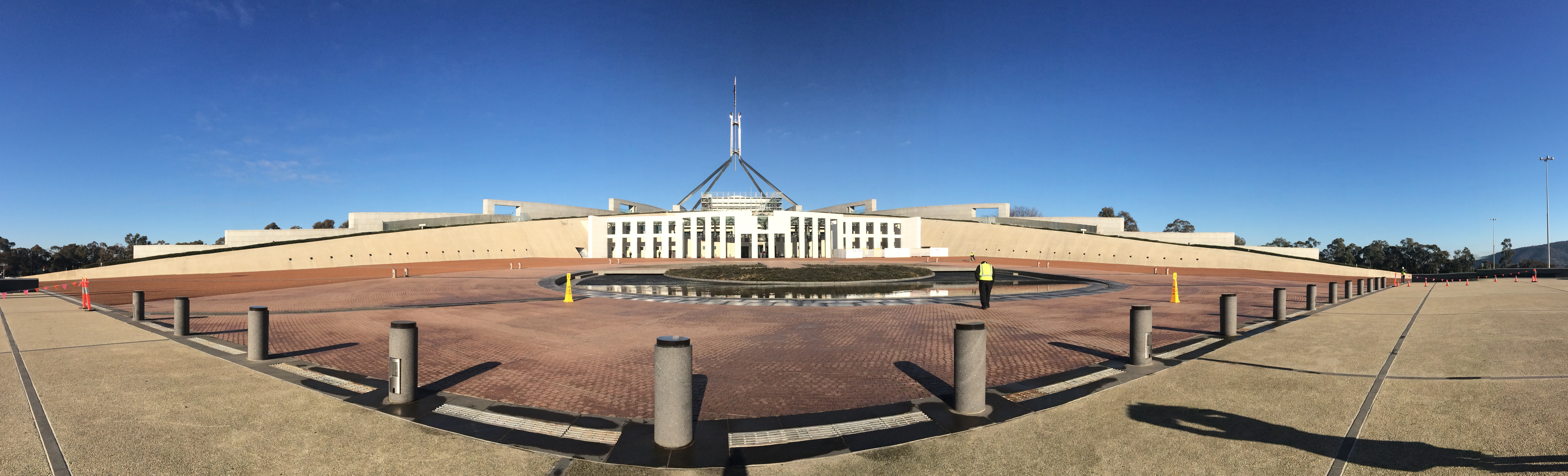 全景照，攝於2018年